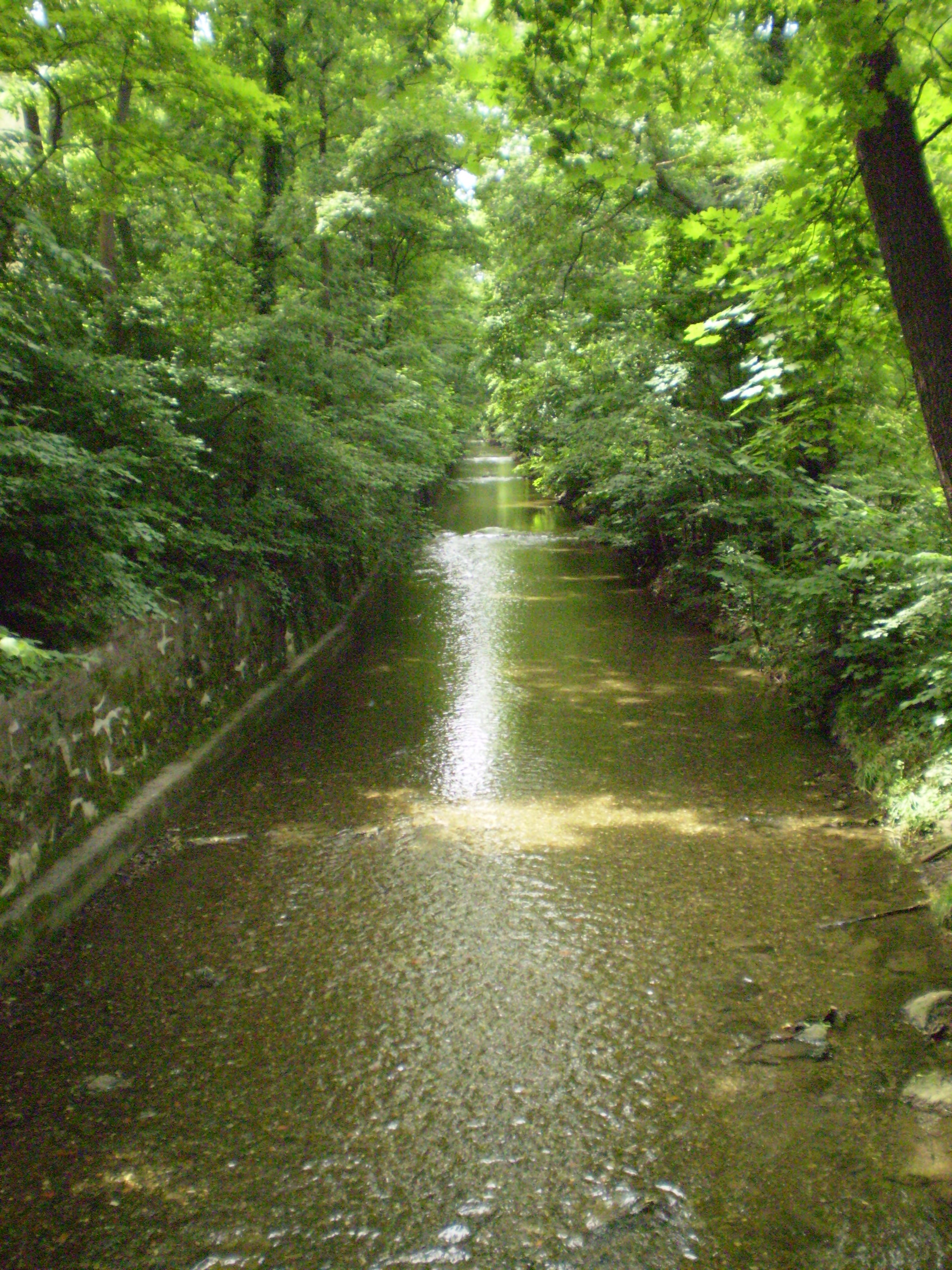 Reiche Liesing in Kalksburg.